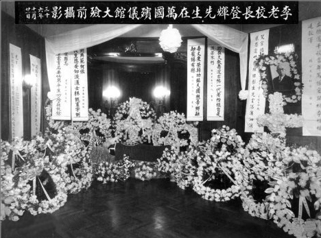 李登辉（1872年－1947年11月），字腾飞，祖籍福建省同安縣（今厦门市），生于荷属东印度爪哇巴达维亚（今印度尼西亚雅加达），中华民国教育家，复旦大学校长，基督徒。